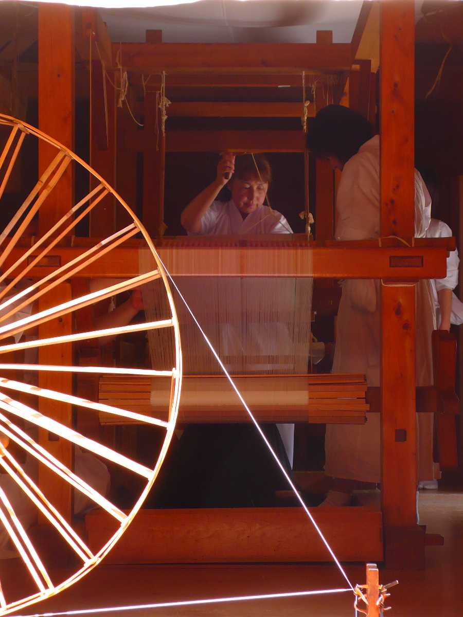 Weaving at Kan-hatori-hatadono-jinja